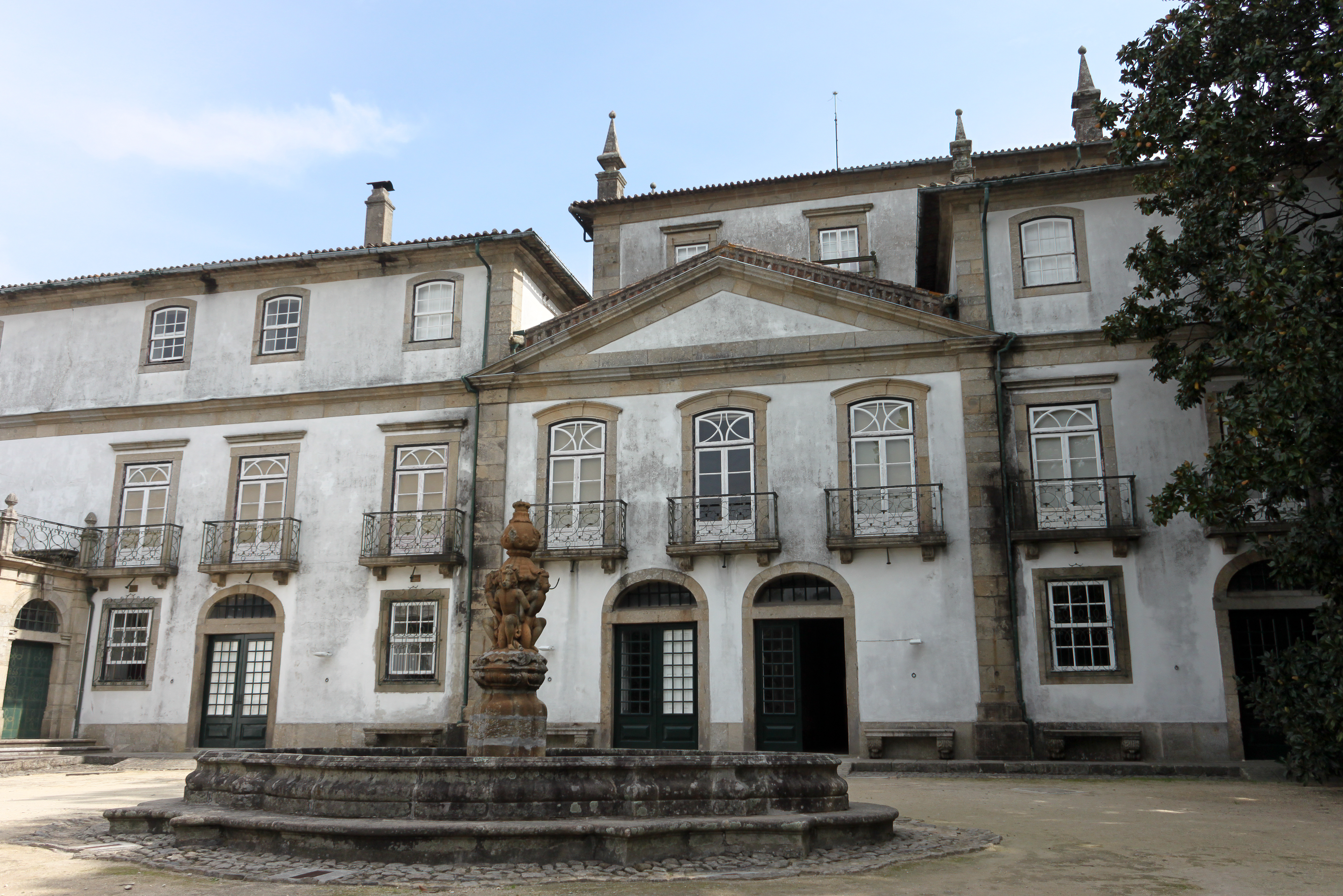 O Museu dos Biscaínhos encontra-se instalado numa casa do século XVII (ampliada no século XVIII) com magníficos jardins de traçado barroco This file was uploaded for Wiki Loves Monuments in Portugal with the unique identifier 73935.